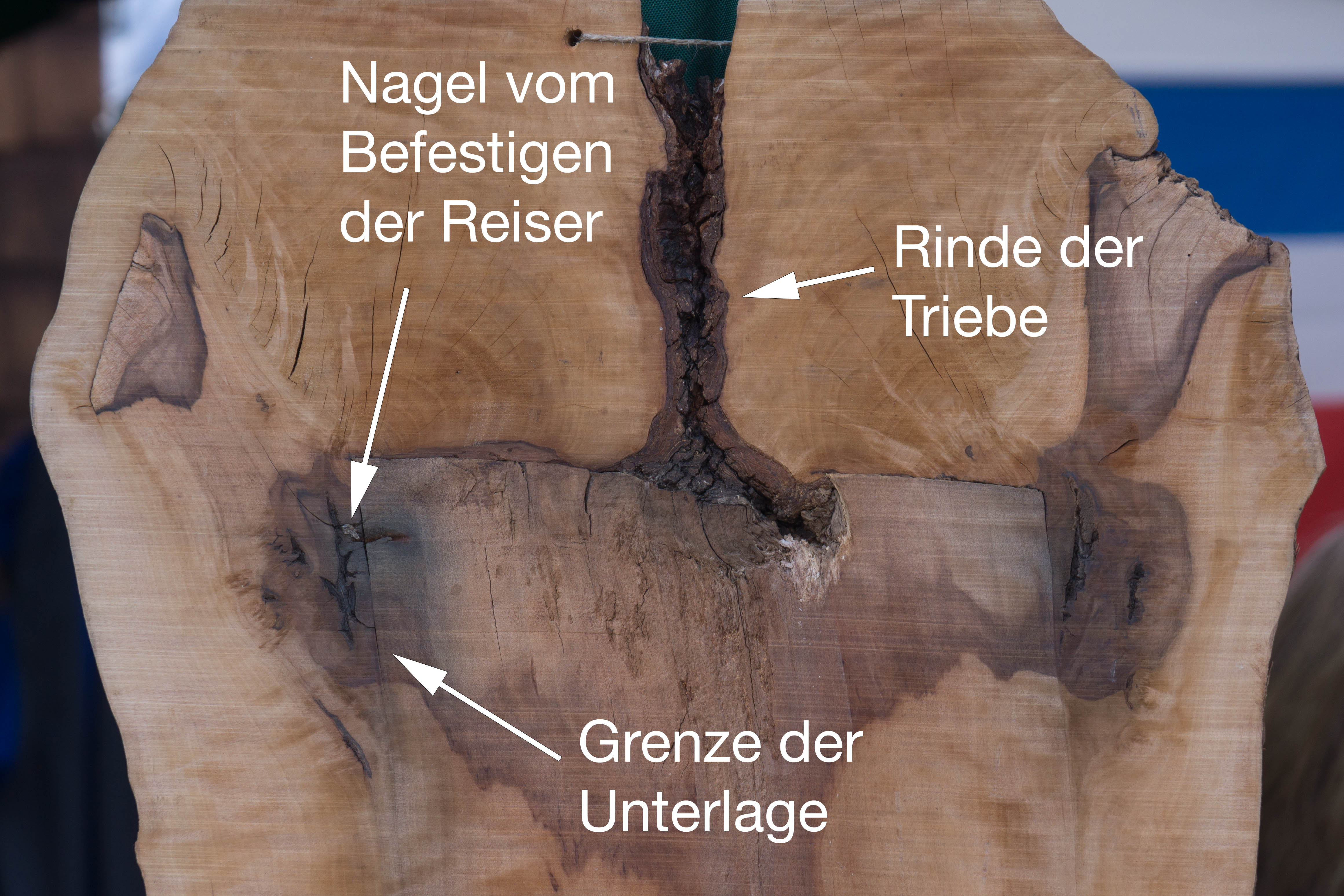 Geißfußveredelung. Schnitt durch die Pfropfstelle eines Birnbaums.